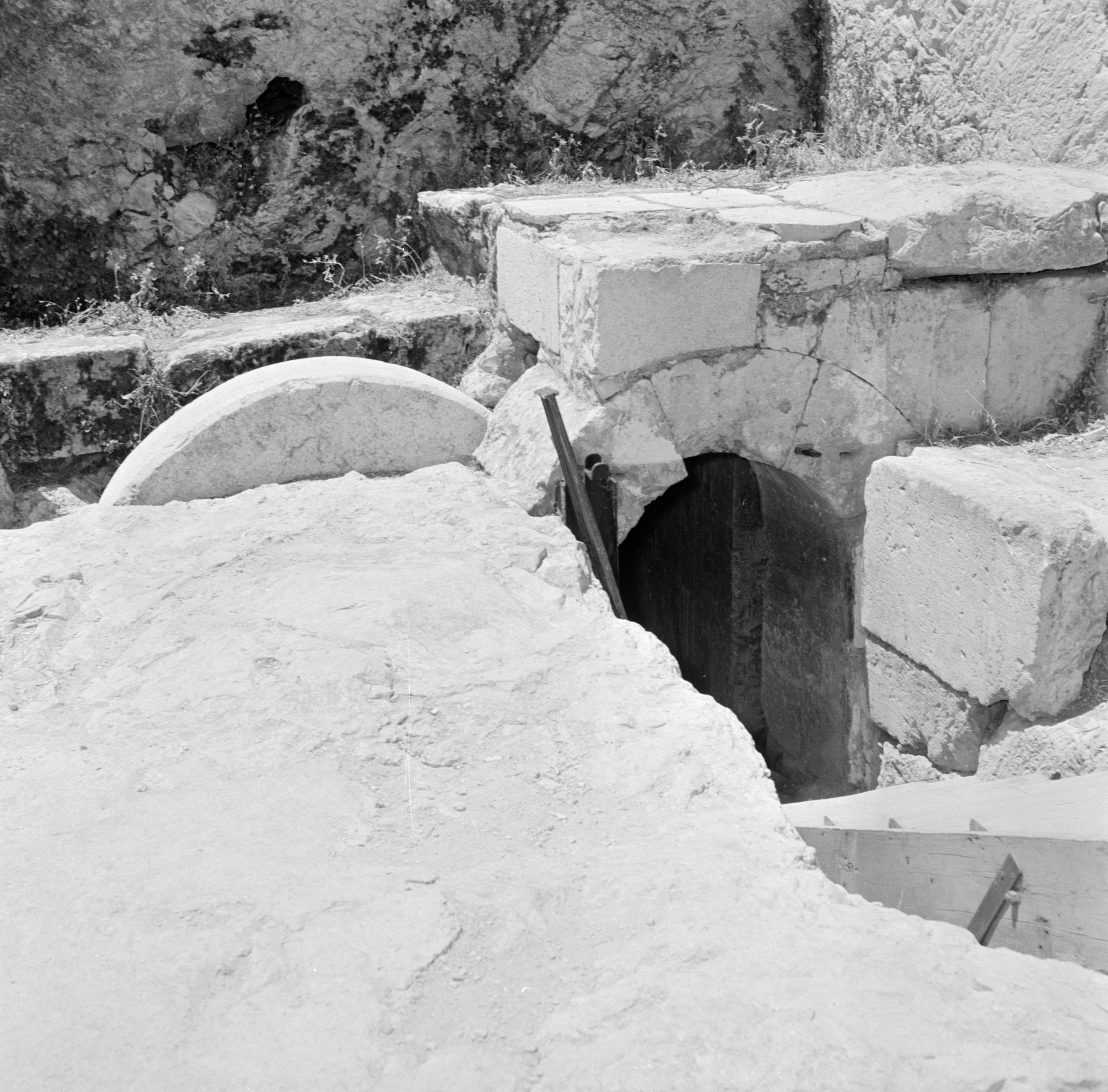 Collectie / Archief : Fotocollectie Van de Poll Reportage / Serie : Israël 1964-1965: Jerusalem (Jeruzalem), familiegraf Herodus Beschrijving : Ingang van het familiegraf van Herodus Annotatie : Natuurlijke grotten werden als familiegraven gebruikt Datum : 1964 Locatie : Israël, Jeruzalem Trefwoorden : graven, rolstenen, toegang Fotograaf : Poll, Willem van de, [onbekend] Auteursrechthebbende : Nationaal Archief Materiaalsoort : Negatief (zwart/wit) Nummer archiefinventaris : bekijk toegang 2.24.14.02 Bestanddeelnummer : 255-2388